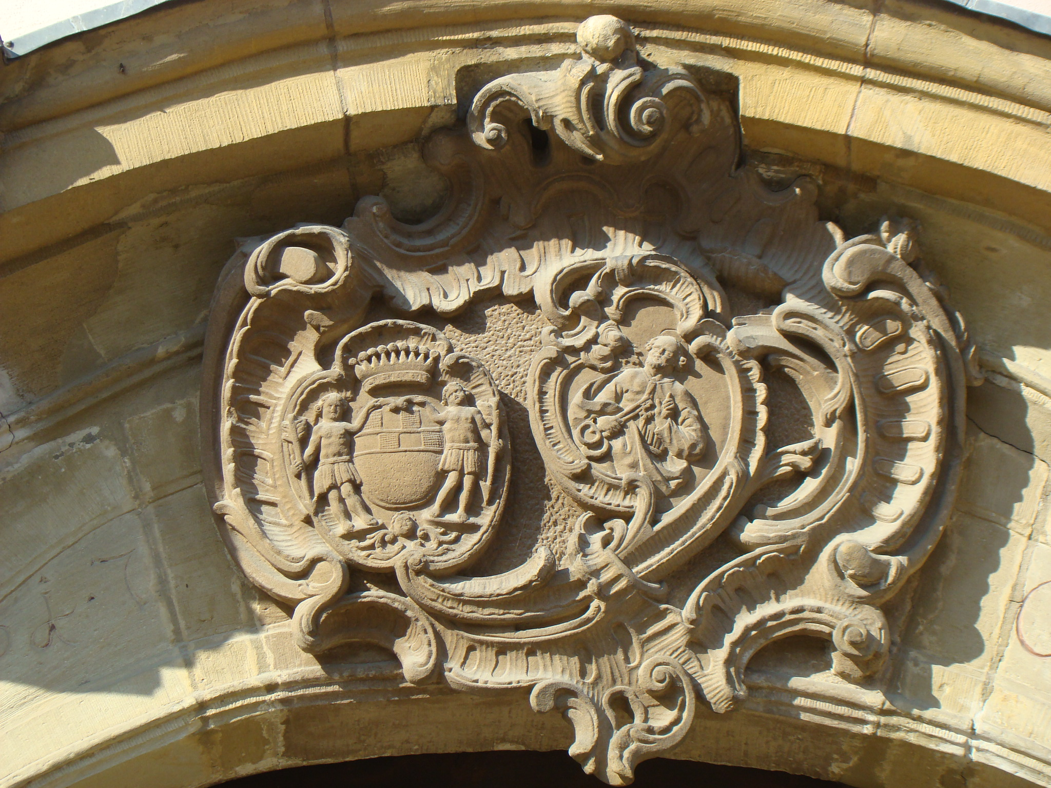 Wappen über dem Portal der ehem. Dechanei des ehem. Ritterstifts in Bad Wimpfen